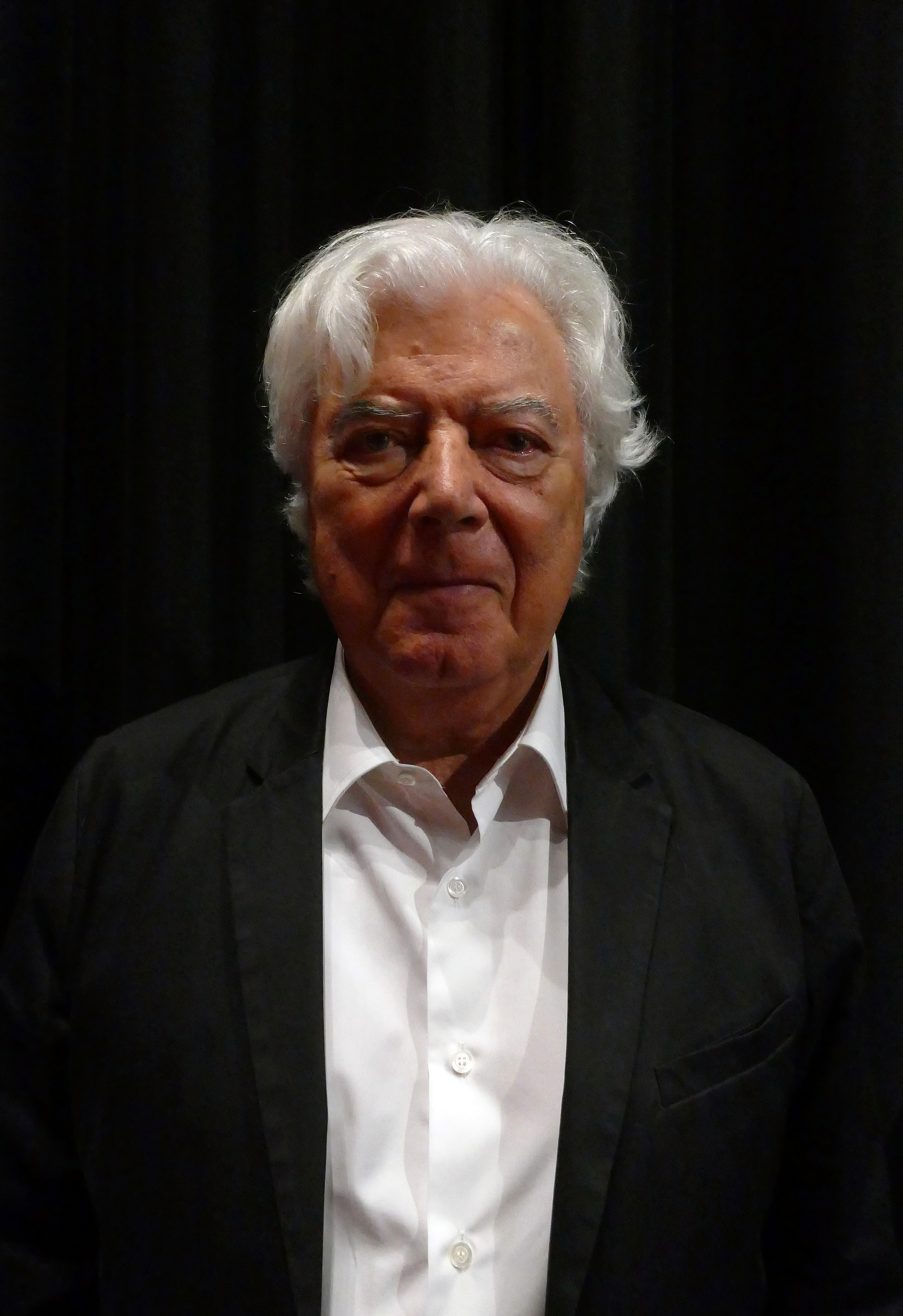 L'artiste et collectionneur d'art José de Guimarães, lors du vernissage de l'exposition qui lui était consacrée au Musée Würth France Erstein.